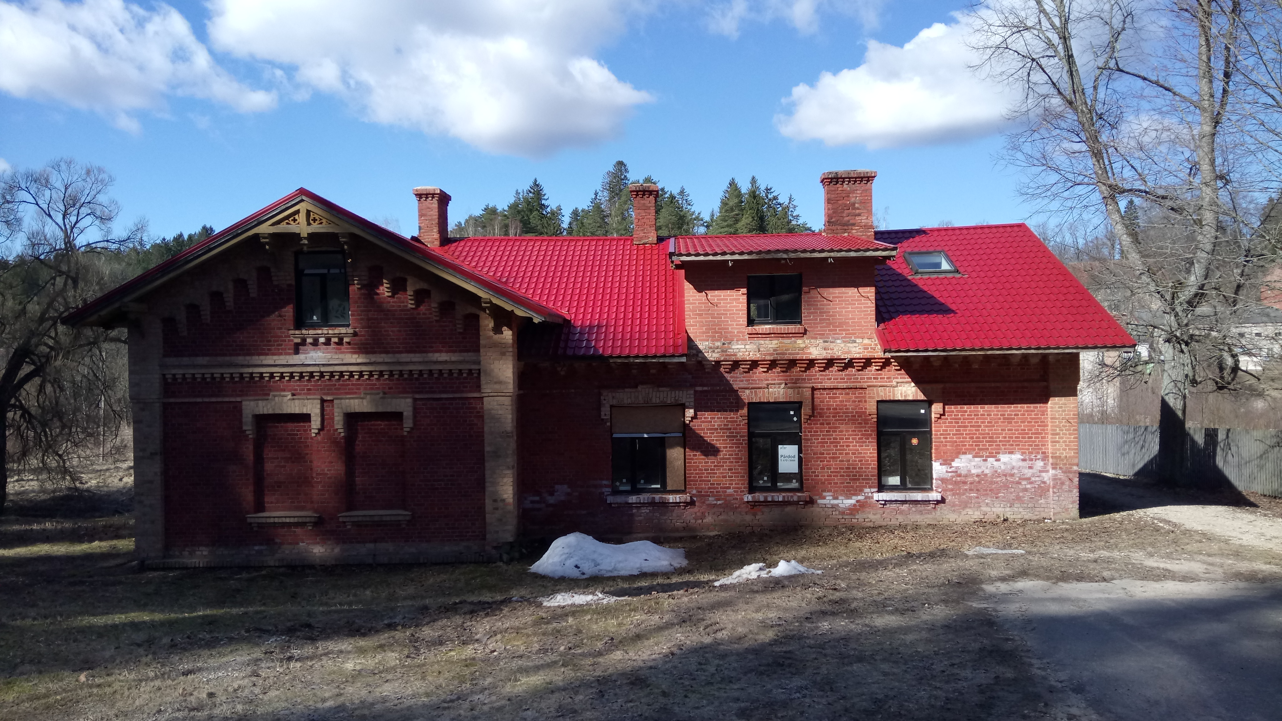 Dzemdību nams mūsdienās